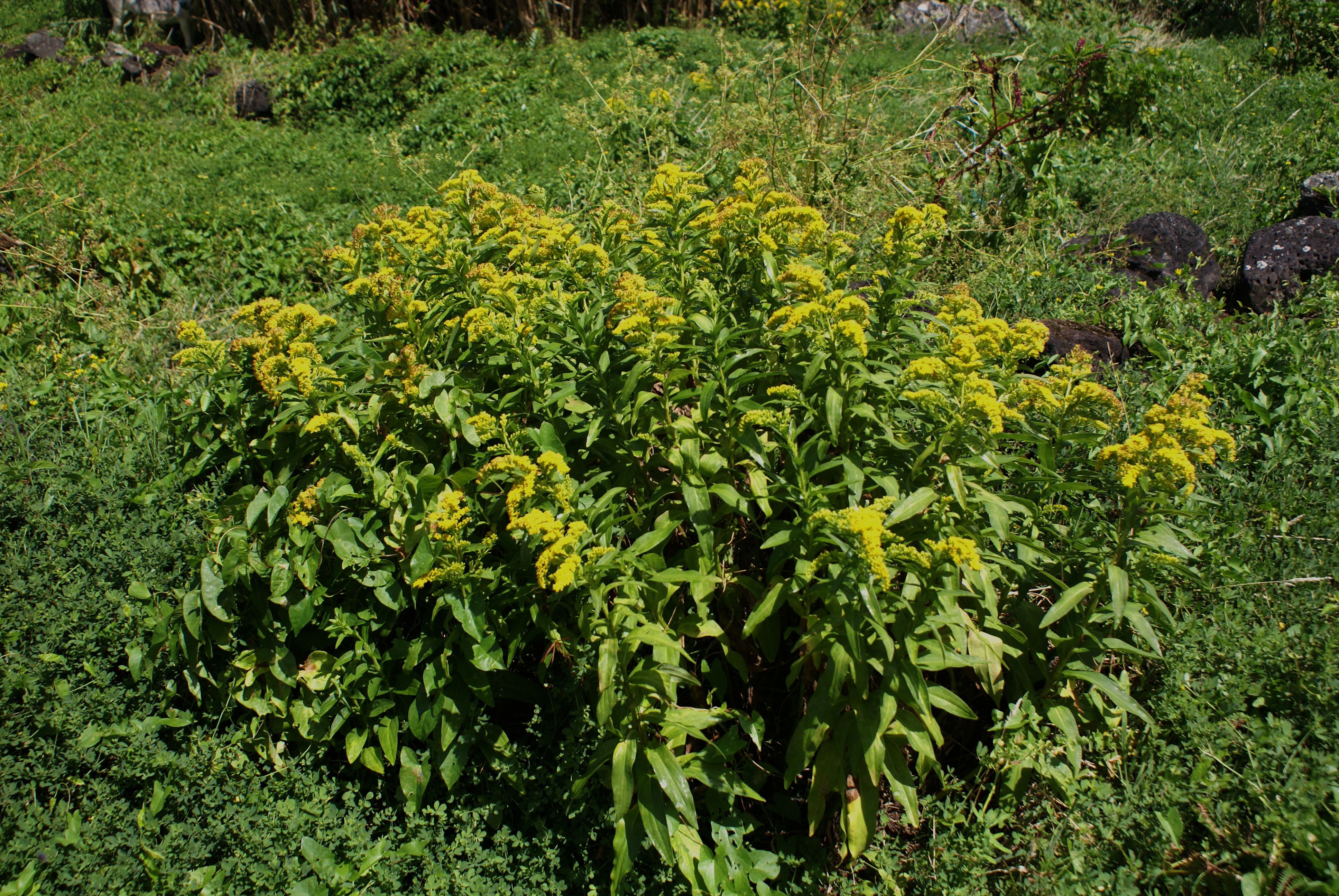 Solidago sempervirens também conhecida pelo nome de Cubres, Fajã Rasa, Toledo, costa Norte da ilha de São Jorge, Velas, Açores